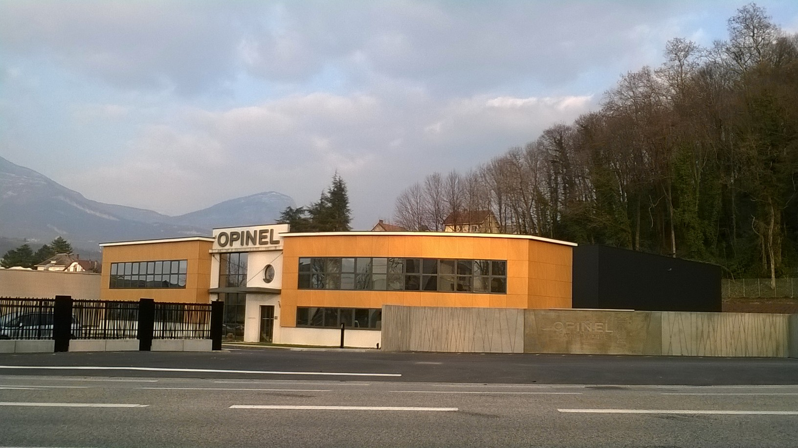 Usine du coutelier Opinel à Chambéry (avenue Henry Bordeaux).